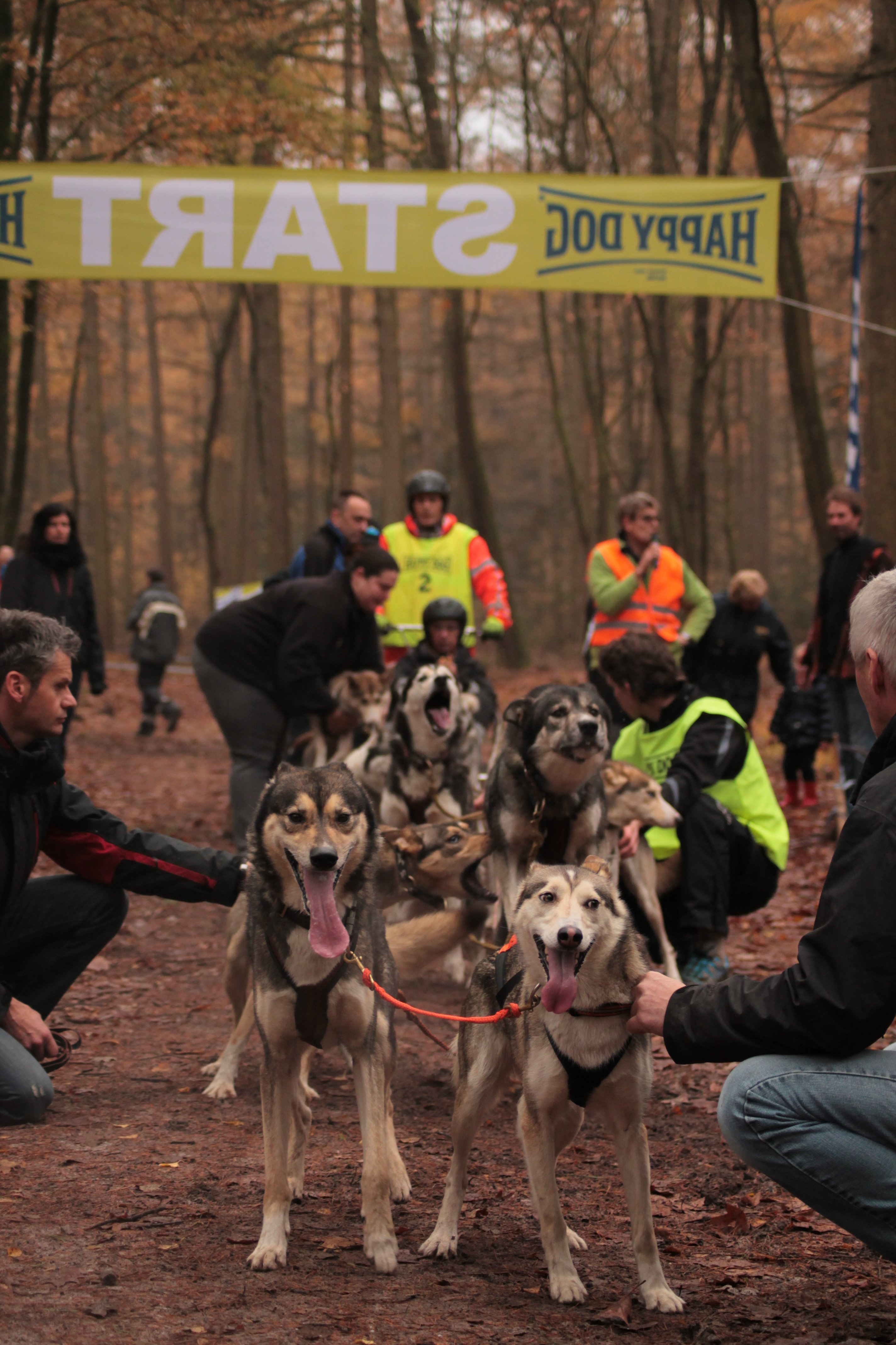 Arie Verschoor al jaren een bekend gezicht in de sledehondensport